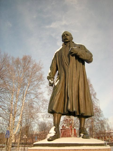 Staty av Anders Zorn i Mora. Av Christian Eriksson (död 1935). Avtäckt vid midsommar 1936.